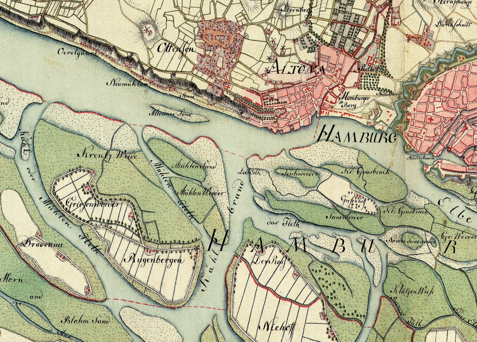 Altona, Hamburg, Harburg. Aufgenommen in den Jahren 1789 bis 1796 unter der Direktion des Majors Gustav Adolf von Varendorf durch Offiziere des Schleswigschen Infanterieregiments